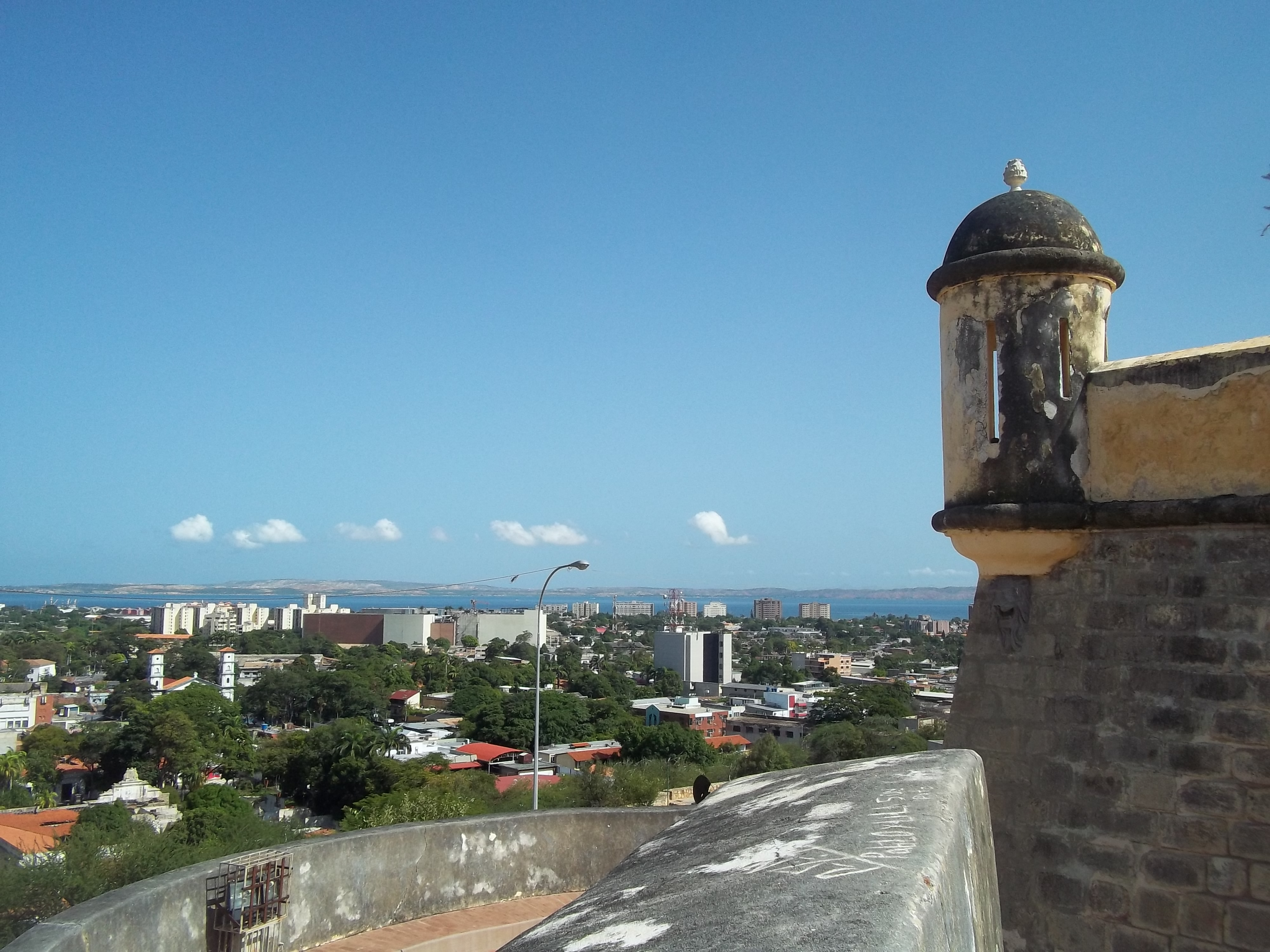 Vista desde el castillo San Antonio de la Eminencia En Cumana Estado Sucre Venezuela